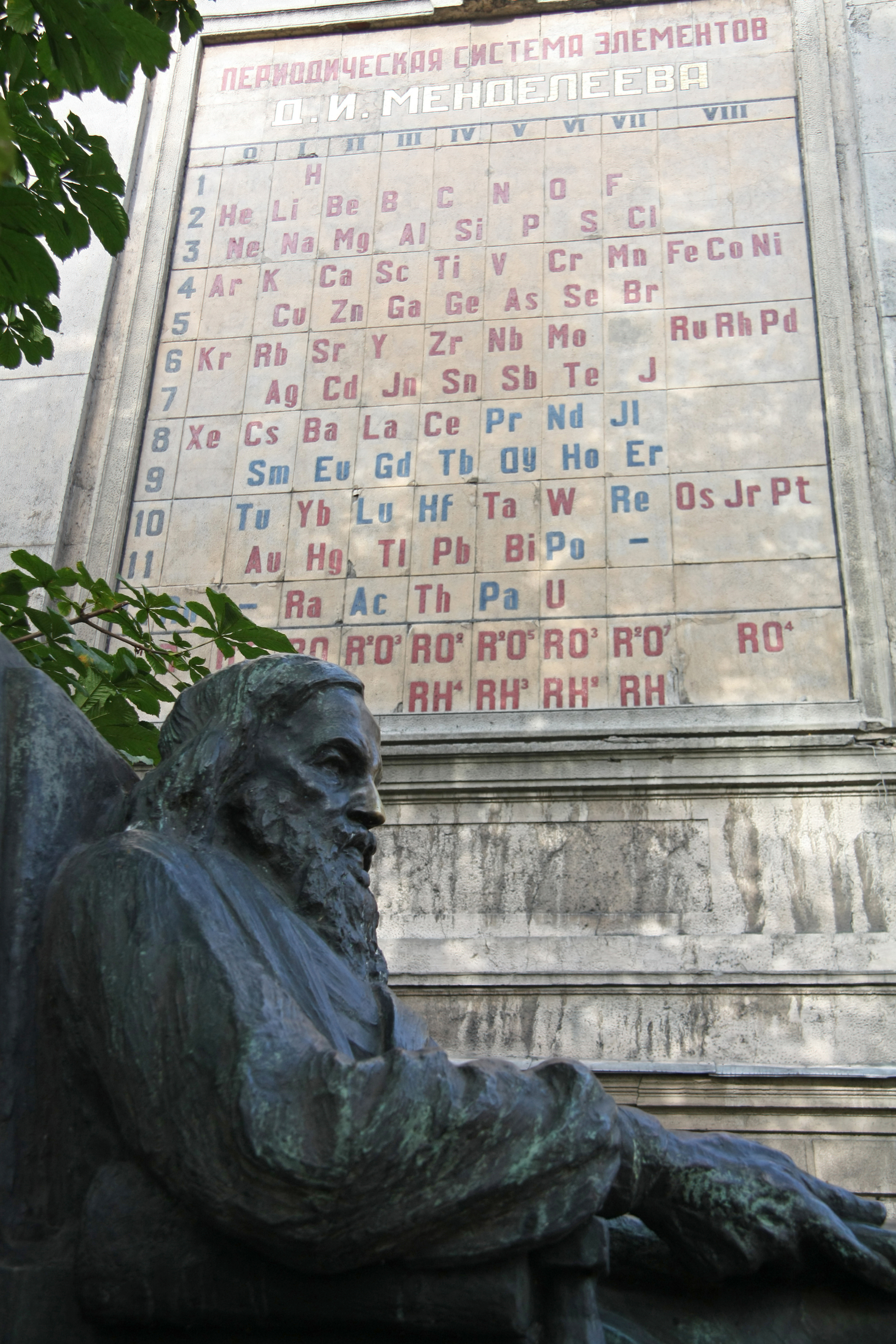 Памятник химику Д.И. Менделееву: Московский проспект, 19, во дворе, Адмиралтейский район, Санкт-Петербург